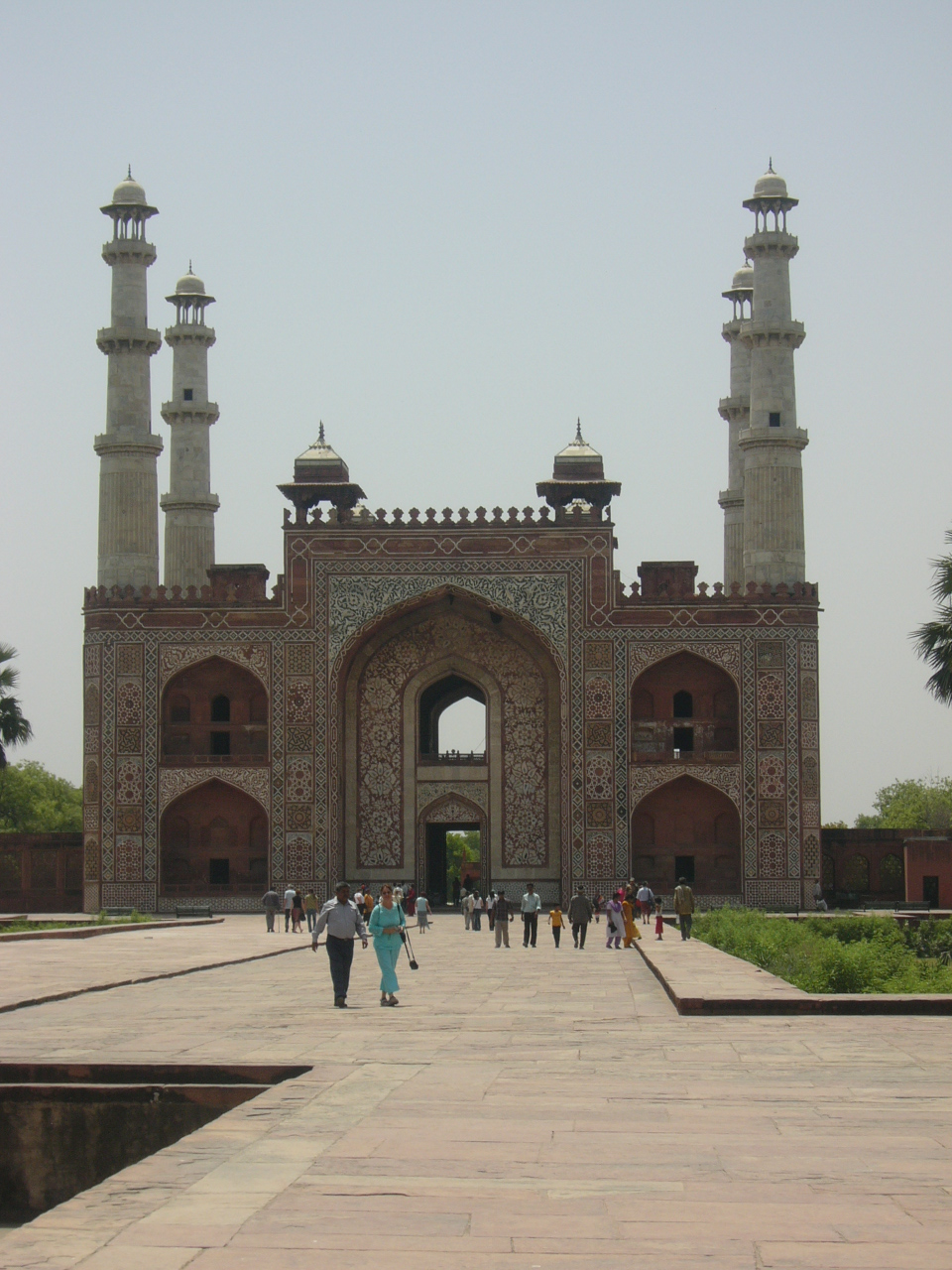 Akbar's Tomb Sikandra Agra India